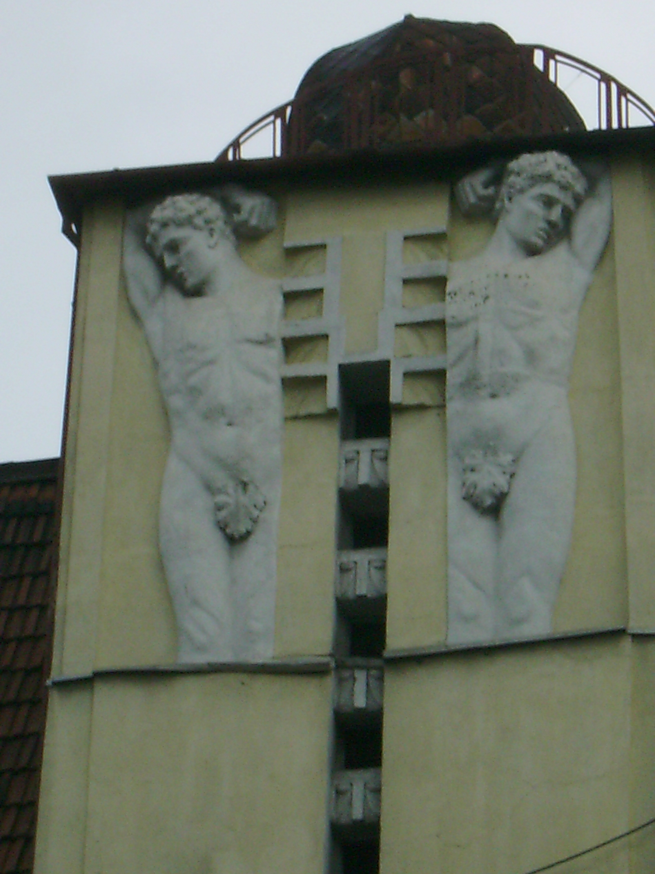 Cluj-Napoca, Palatul Urania (detaliu), str.Horea